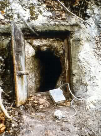 Eingang Lichtensteinhöhle